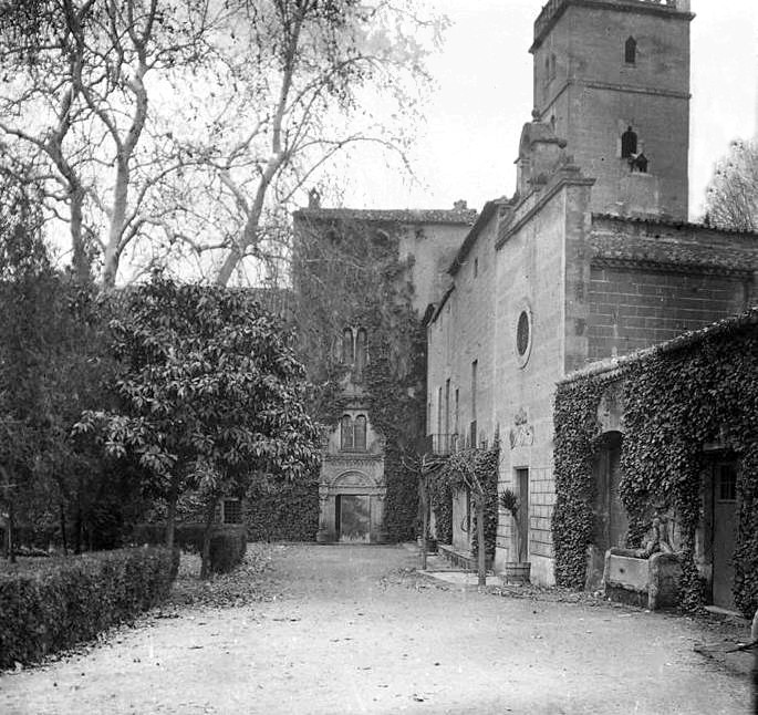 Capella i casa a Santa Perpètua de Mogoda. Josep Salvany i Blanch (1915)